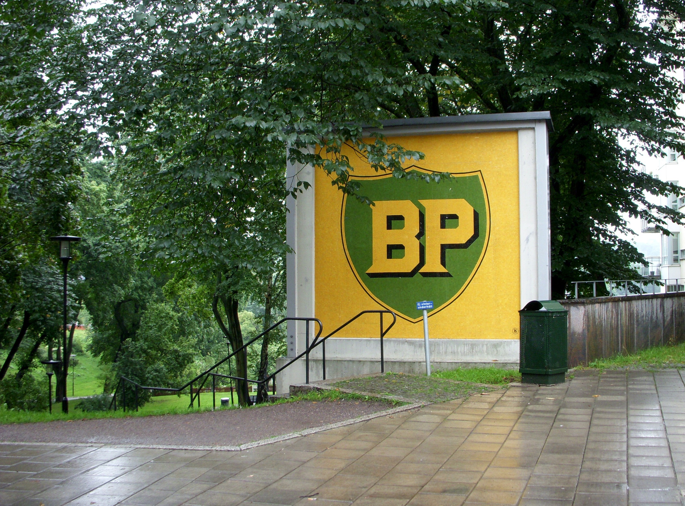 Mosaik-BP-skylten vid Ringvägen i Stockholm (k-märkt)